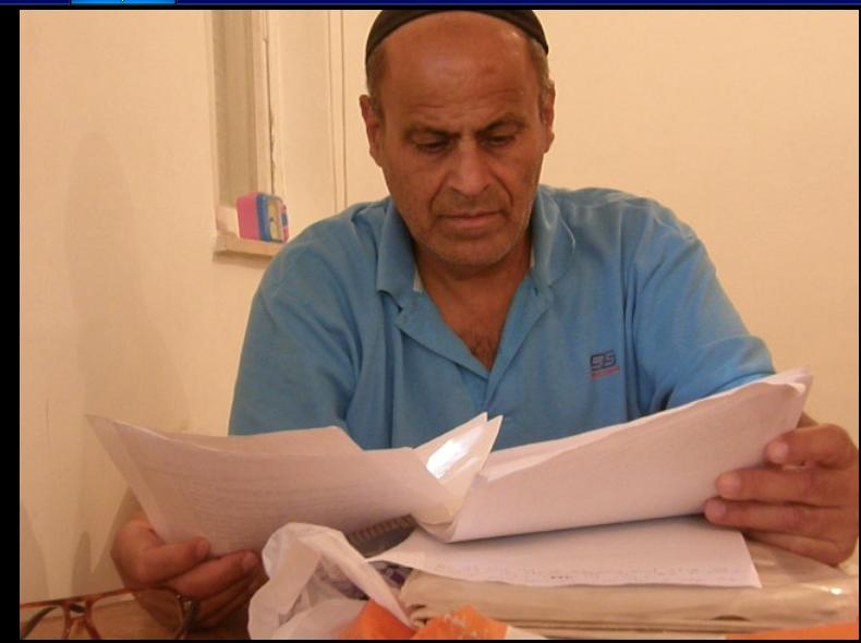 יחזקאל קדמי קורא בביתו, צילום - יוסף עוזר